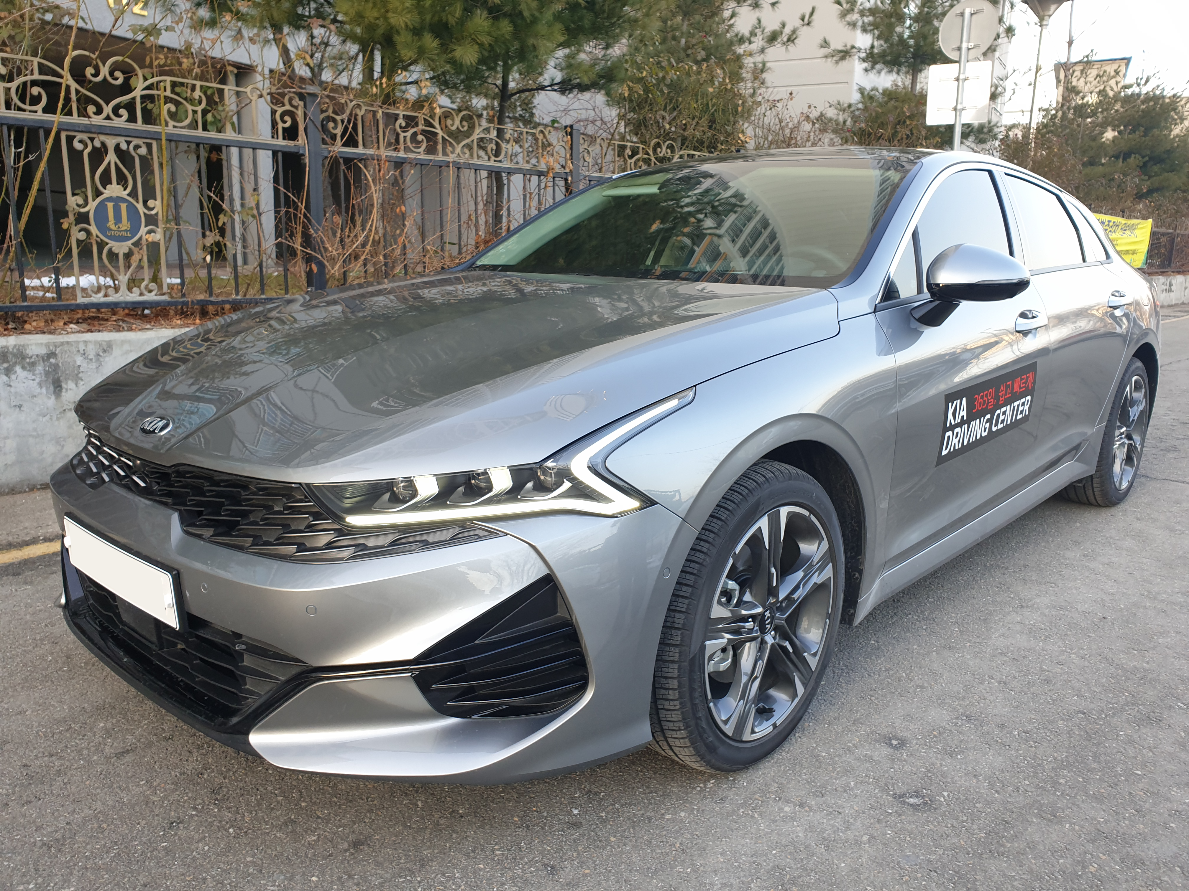 기아 K5 3세대 정측면. 프로젝트명 DL3.